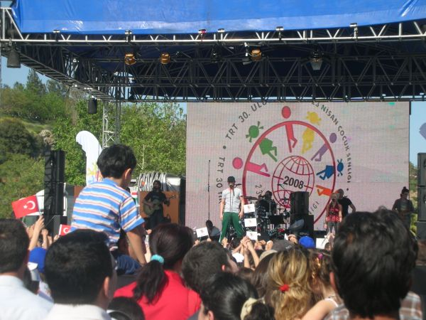 Murat Boz, 23 Nisan Çocuk Şenliği Antalya Konyaaltı Plajı konseri, 2008.